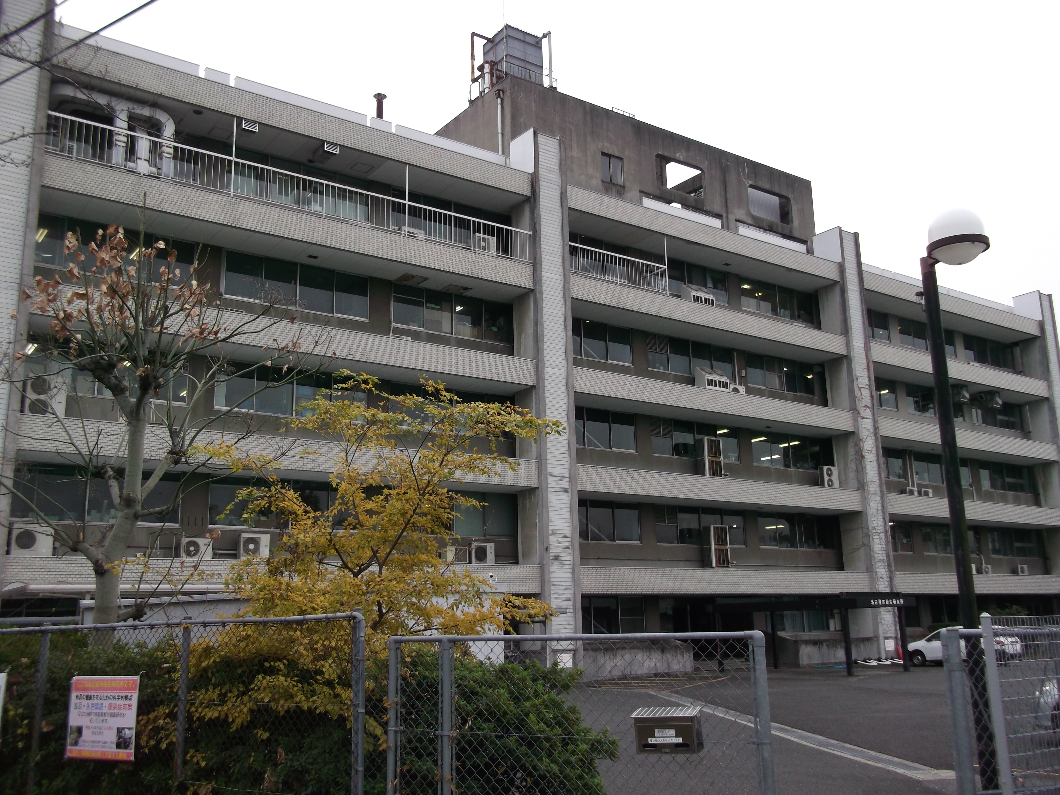 名古屋市瑞穂区萩山町にある名古屋市衛生研究所を北東側から写す